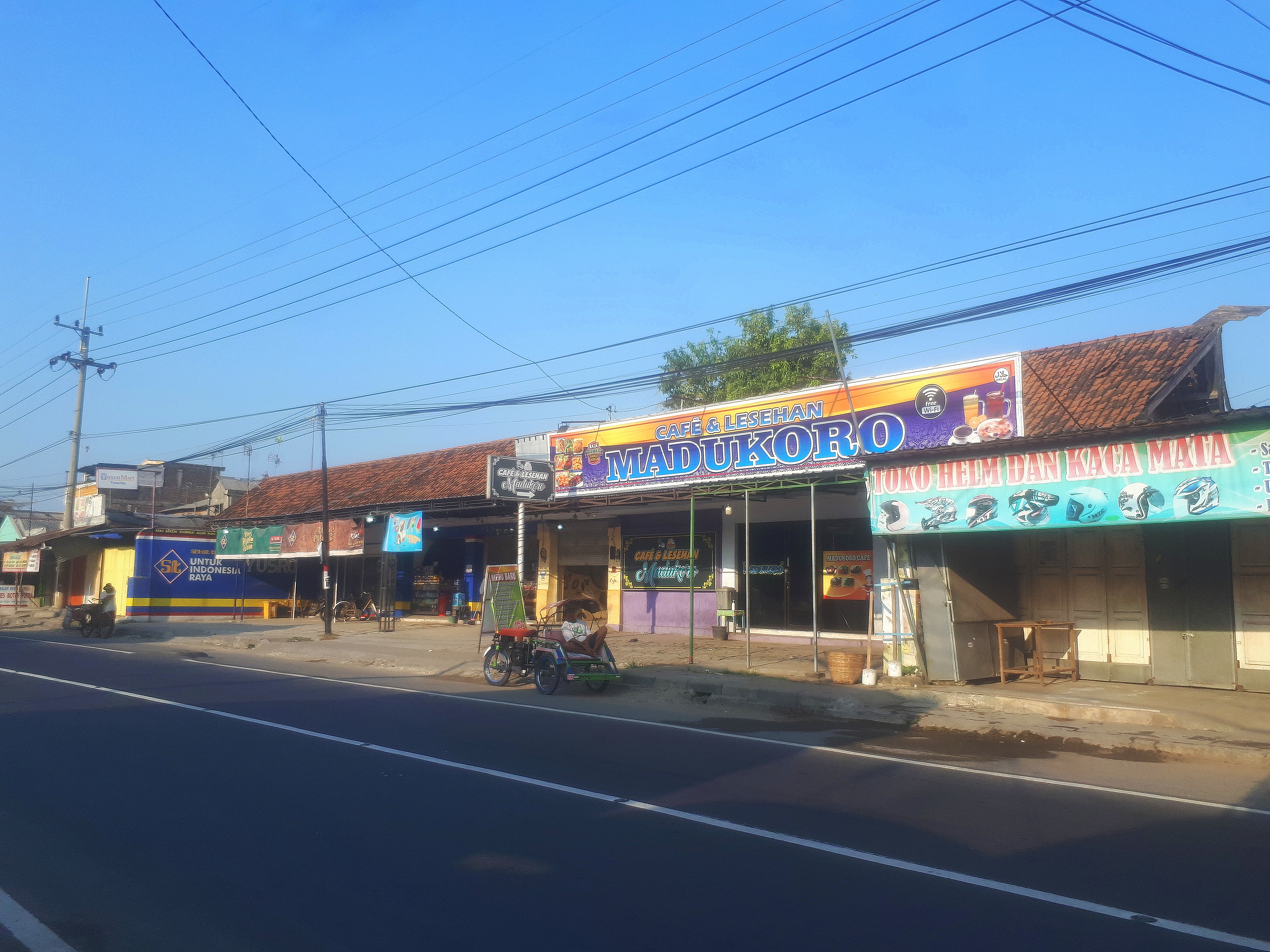 Tampak depan bangunan Stasiun Ploso di Kabupaten Jombang yang kini beralih fungsi menjadi pertokoan, 2020